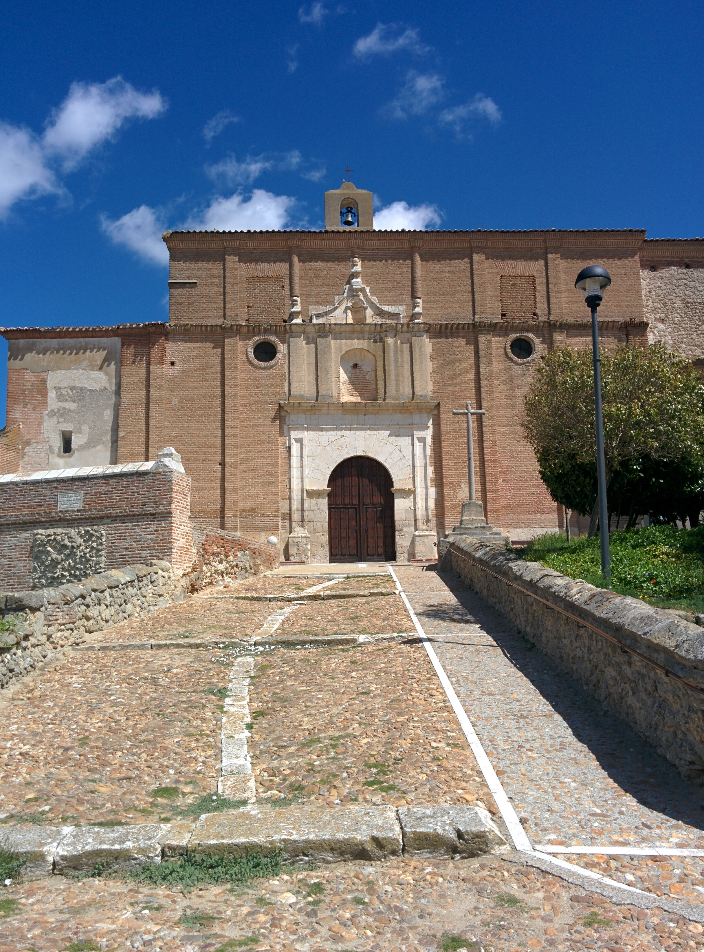 Iglesia de Santa María del Castillo, en Rubí de Bracamonte (Valladolid, España).